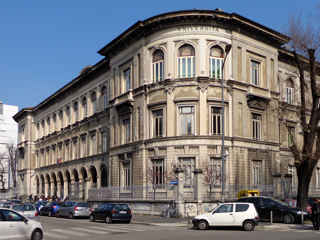 Milano, edificio della Facoltà di Scienze biologiche e matematiche, in via Cesare Saldini n. 50 e in via Sandro Botticelli n. 21 (angolo via Luigi Mangiagalli); fu costruito intorno al 1915 su progetto di Pier Giulio Magistretti.Fonte: Maurizio Boriani, Corinna Morandi, Augusto Rossari, Milano contemporanea. Itinerari di architettura e di urbanistica, Maggioli Editore, 2007, p. 226. ISBN 978-88387-4147-6 Invalid ISBN.